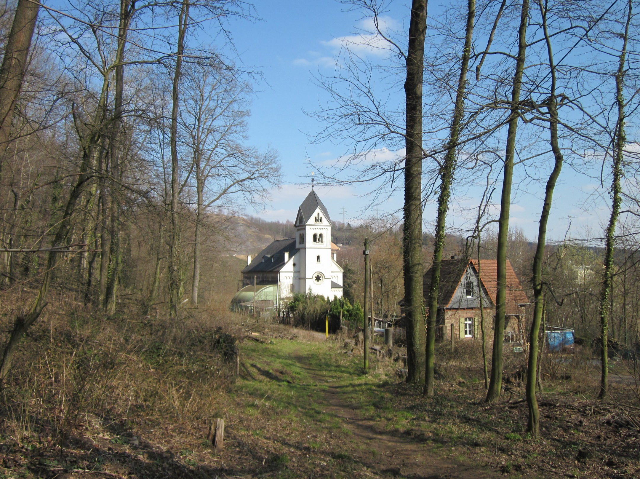 Stummsche Kapelle am Halberg (Saarbrücken)